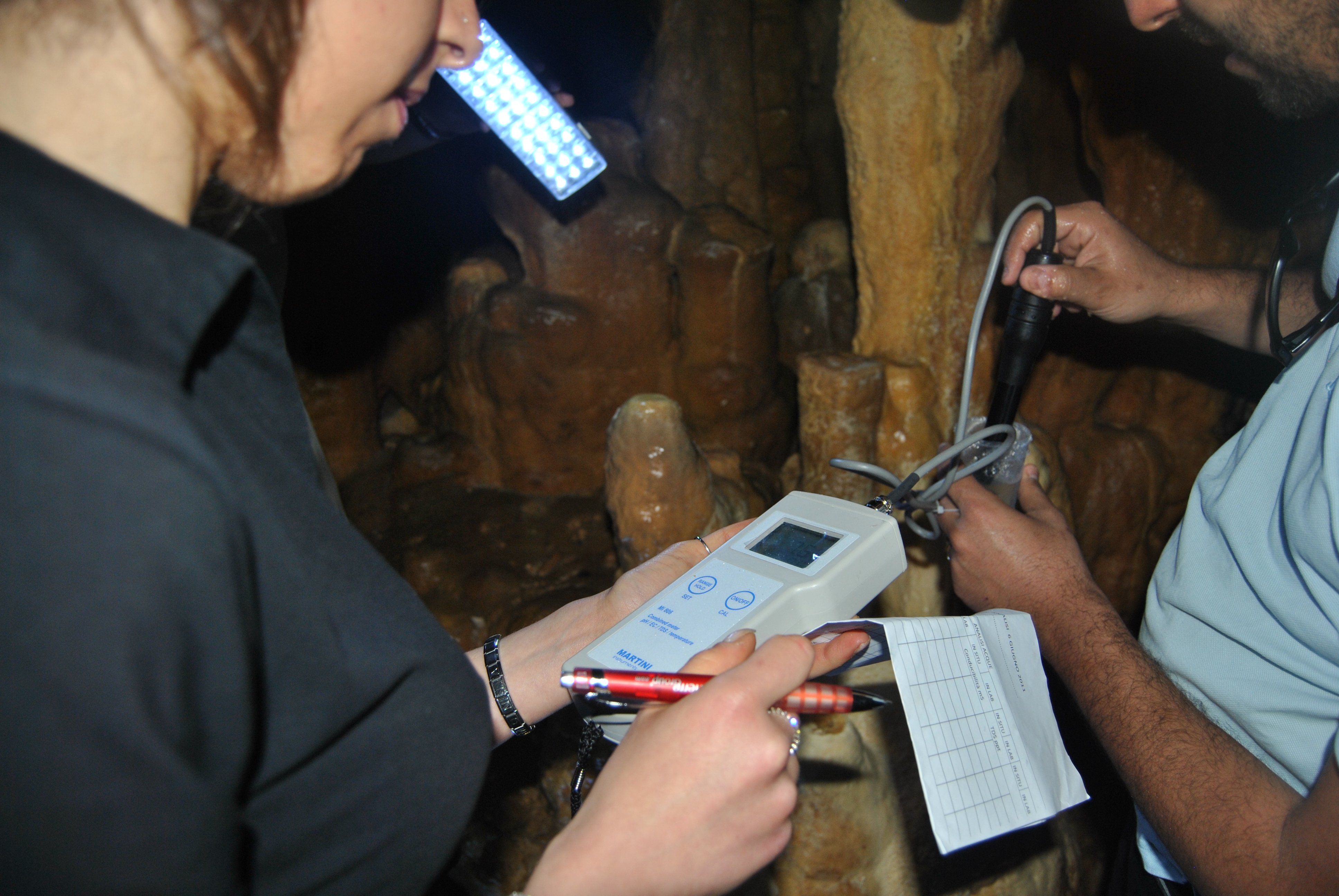 Rilievo dati delle risorse idriche presso una grotta carsica, effettuato da personale scientifico del C.U.T.G.A.N.A.